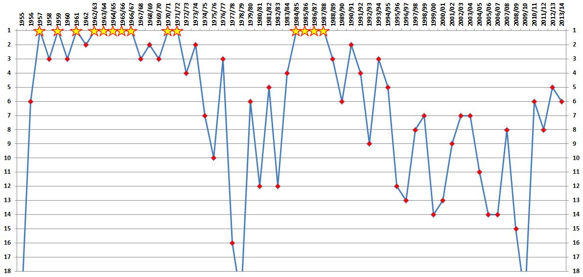 historia występow Górnika Zabrze w najwyższej klasie rozgrywkowej w Polsce